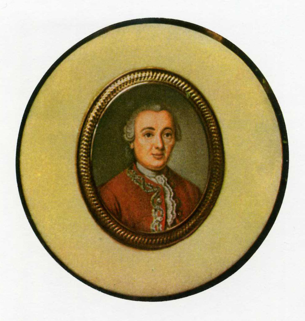 Michael Gabriel Fredersdorf. Aquarell auf Elfenbein, 3,3 x 2,8 cm. Stiftung Preußische Schlösser und Gärten, GK I 41656, Kriegsverlust, ehemals Hohenzollern-Museum, September 1940 Schloss Berlin